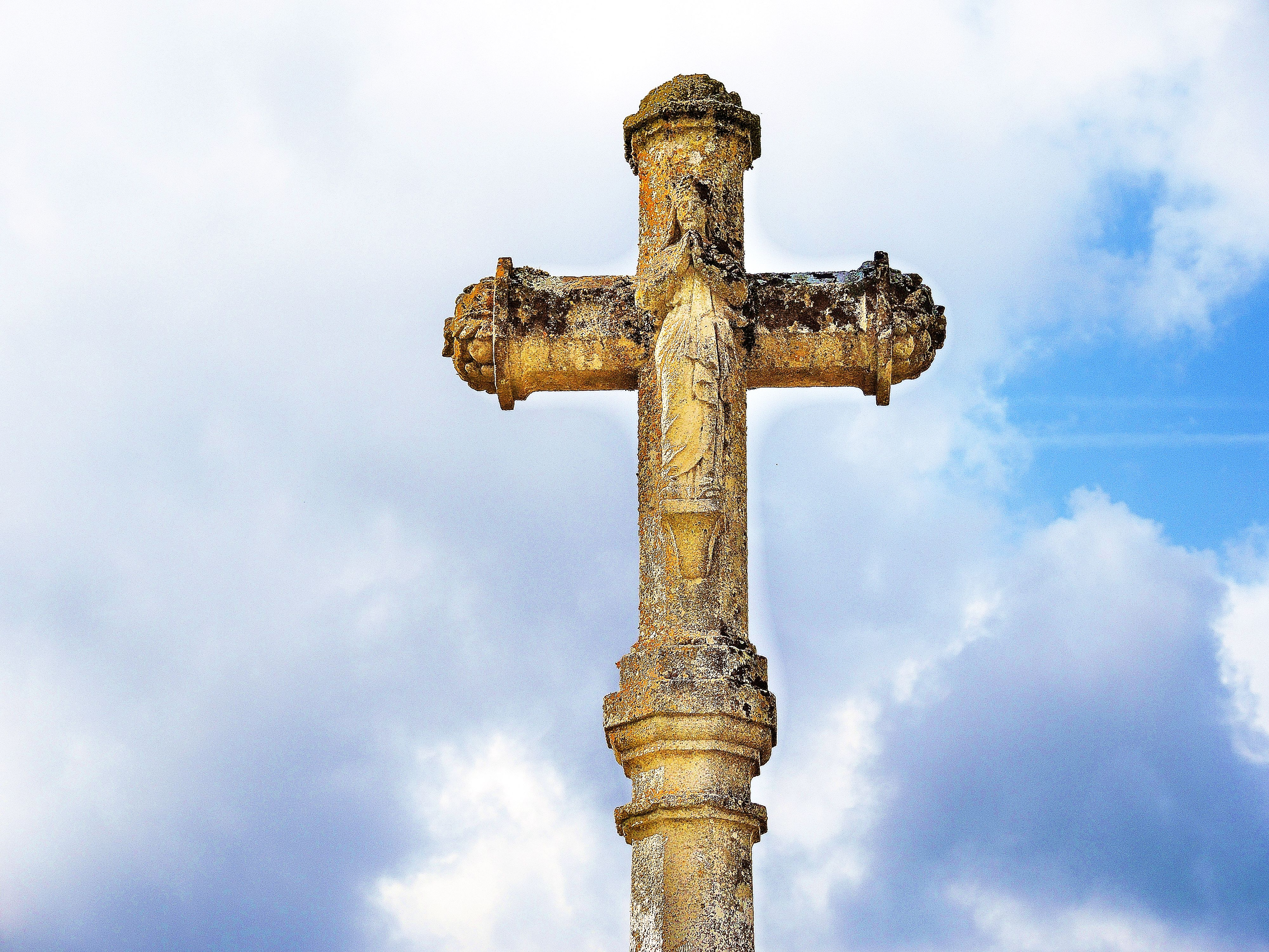 Détail de la croix de chemin au lieu-dit Moulin du haut.